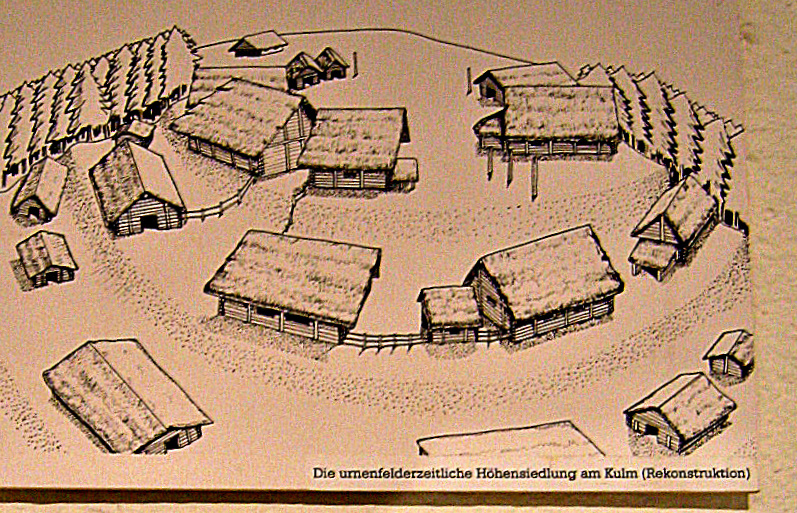 Skizze Prähistorische Siedlung auf dem Kulm bei Trofaiach